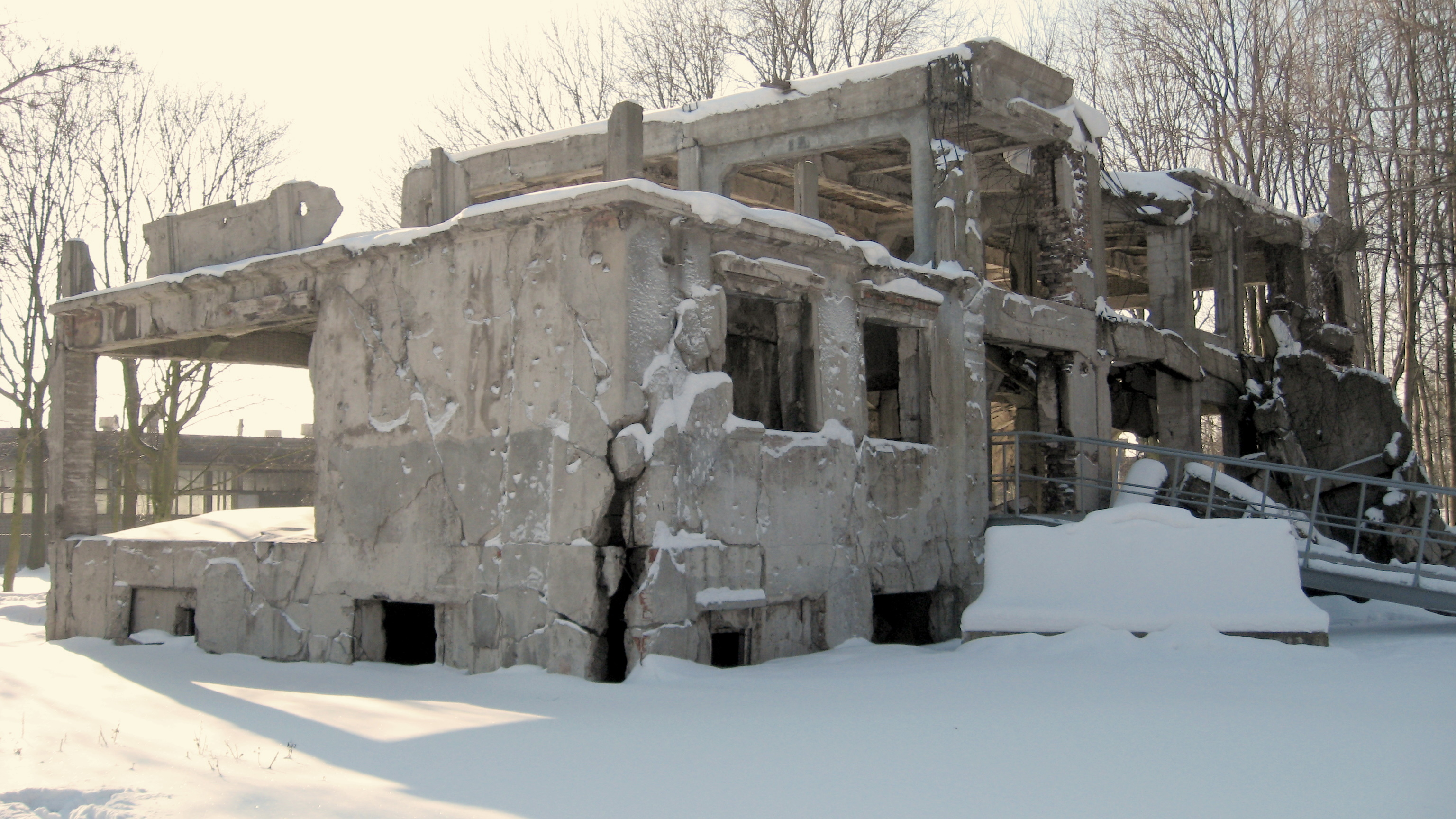 Koszary, Westerplatte